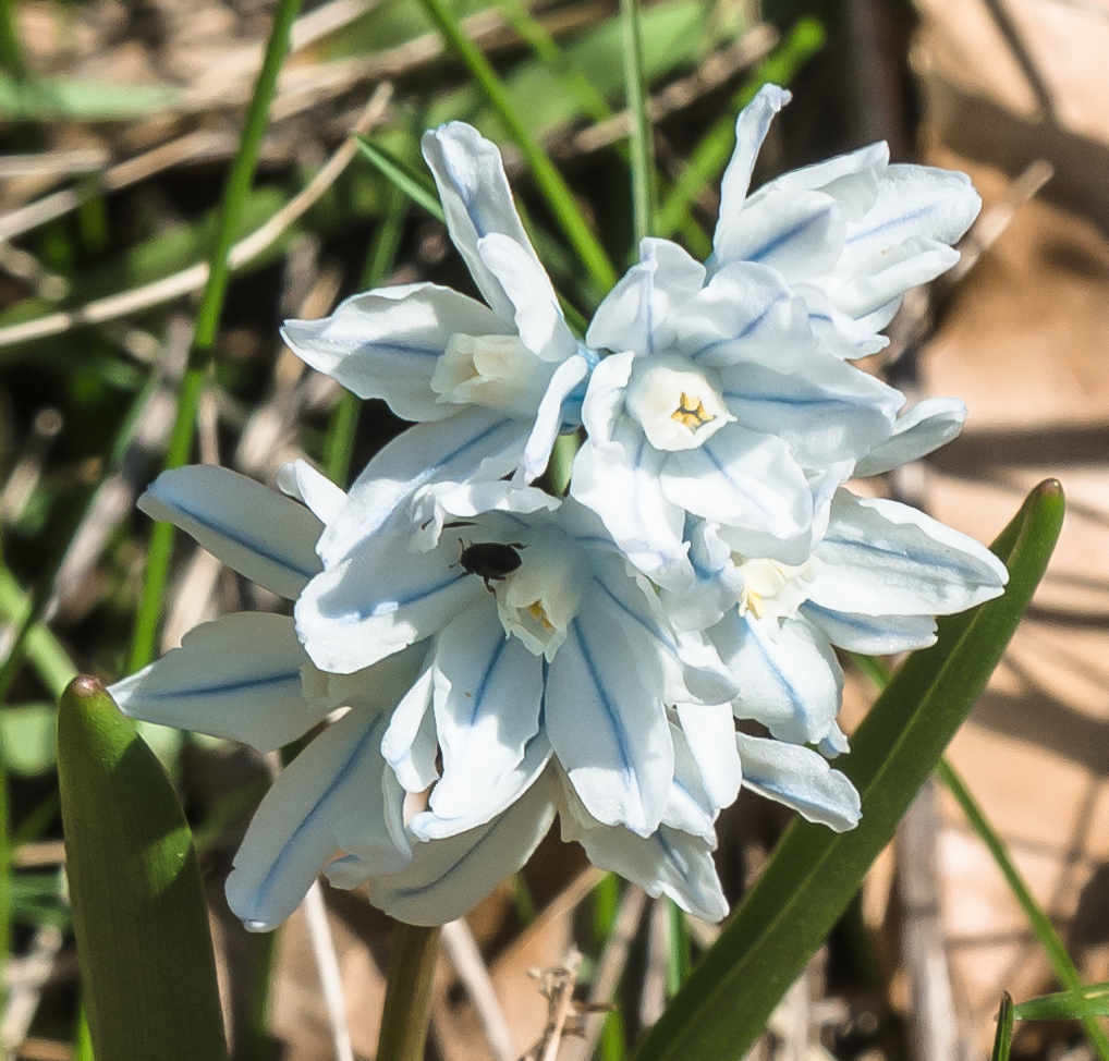 Puschkinie